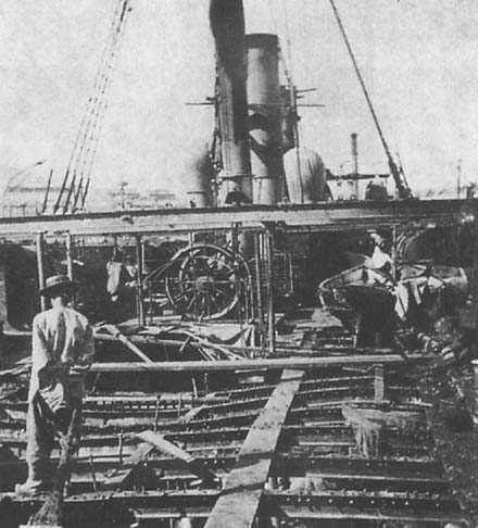 Фотография крейсера Лайюань после битвы у Ялу 1894 г.